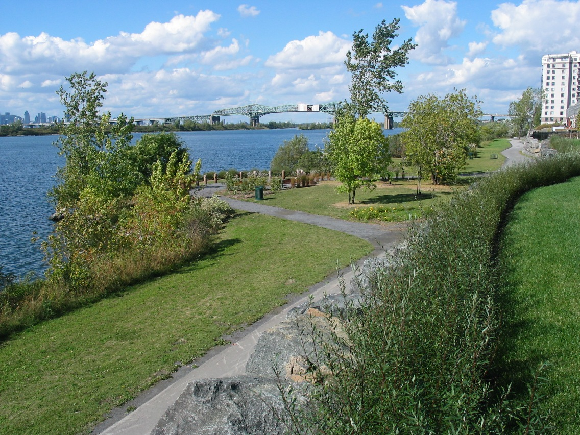 Ville de Brossard